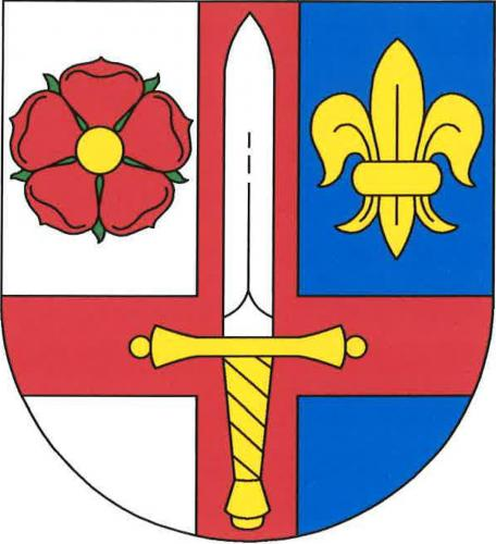 Znak obce Strýčice